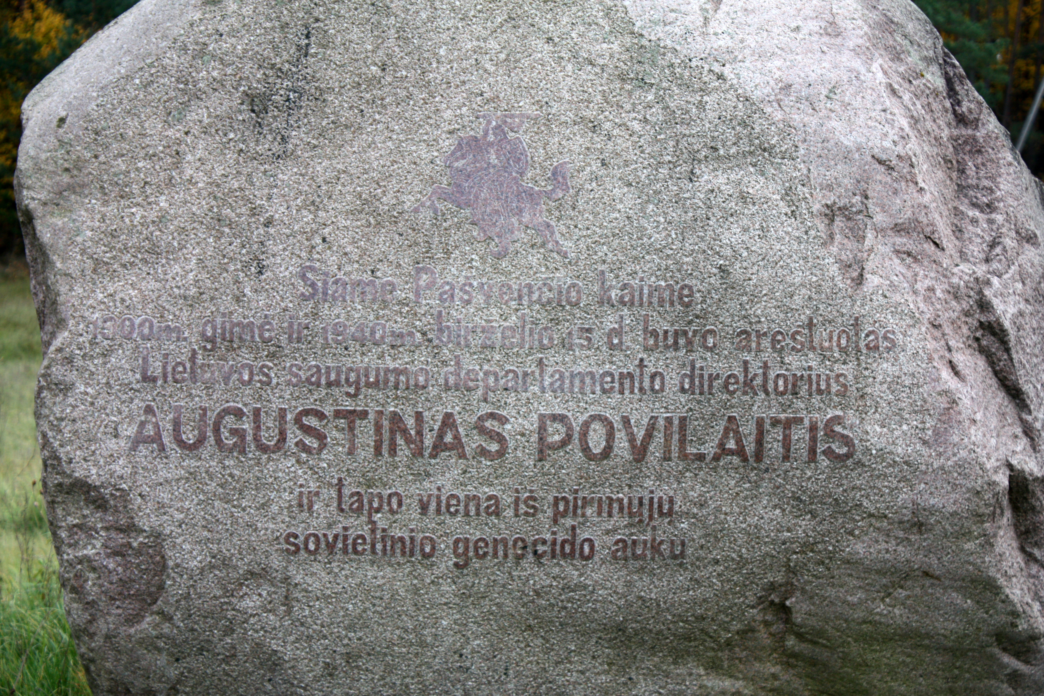 Augustino Povilaičio paminklo pašųventyje fragmentas. G. Kulikausko fotografija.